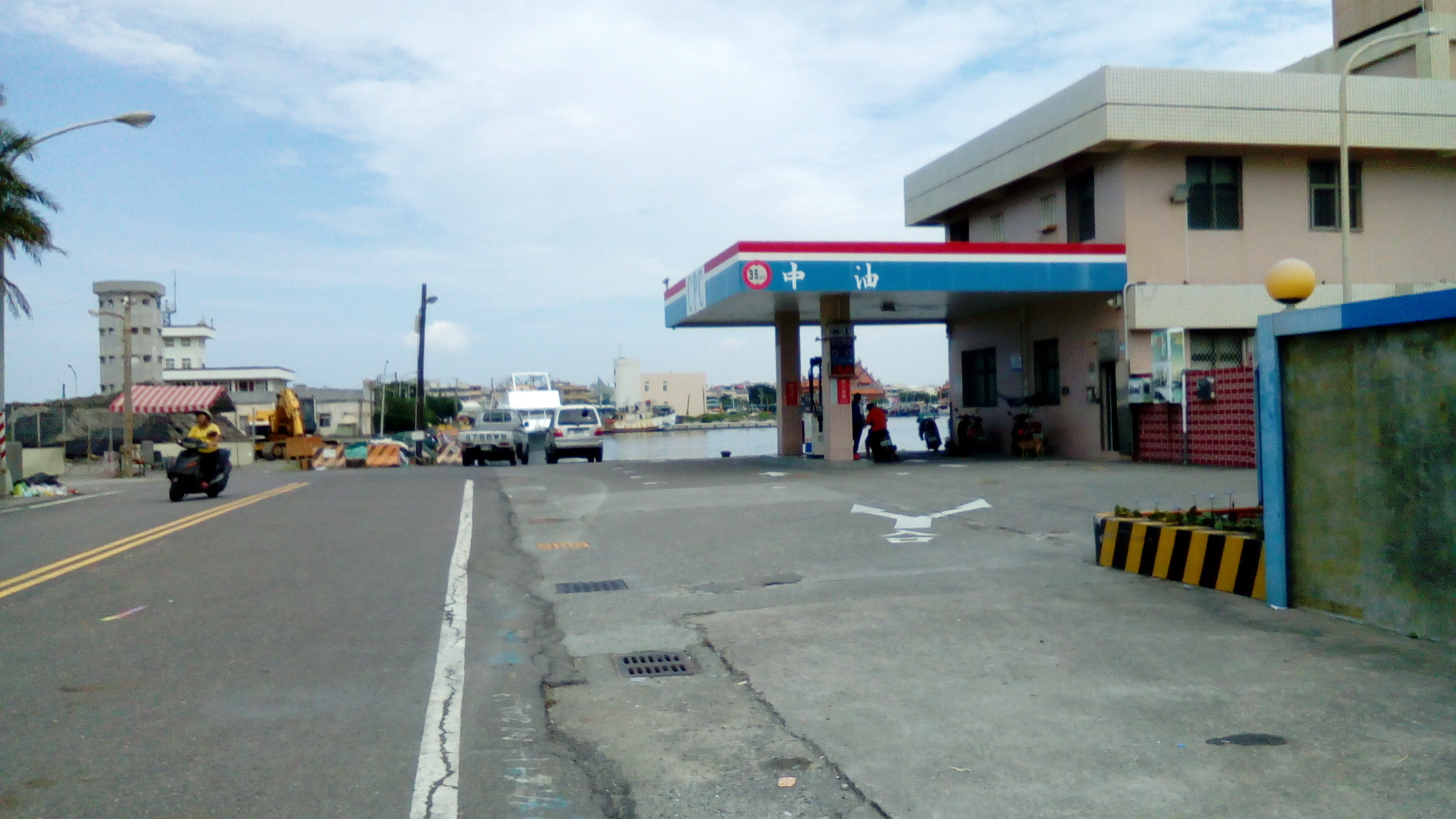 台灣中油蚵仔寮站，蚵仔寮漁港旁的迷你加油站，站體明顯偏小許多。